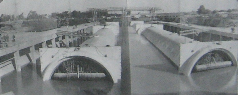 Construcción del Túnel Subfluvial Hernandarias.